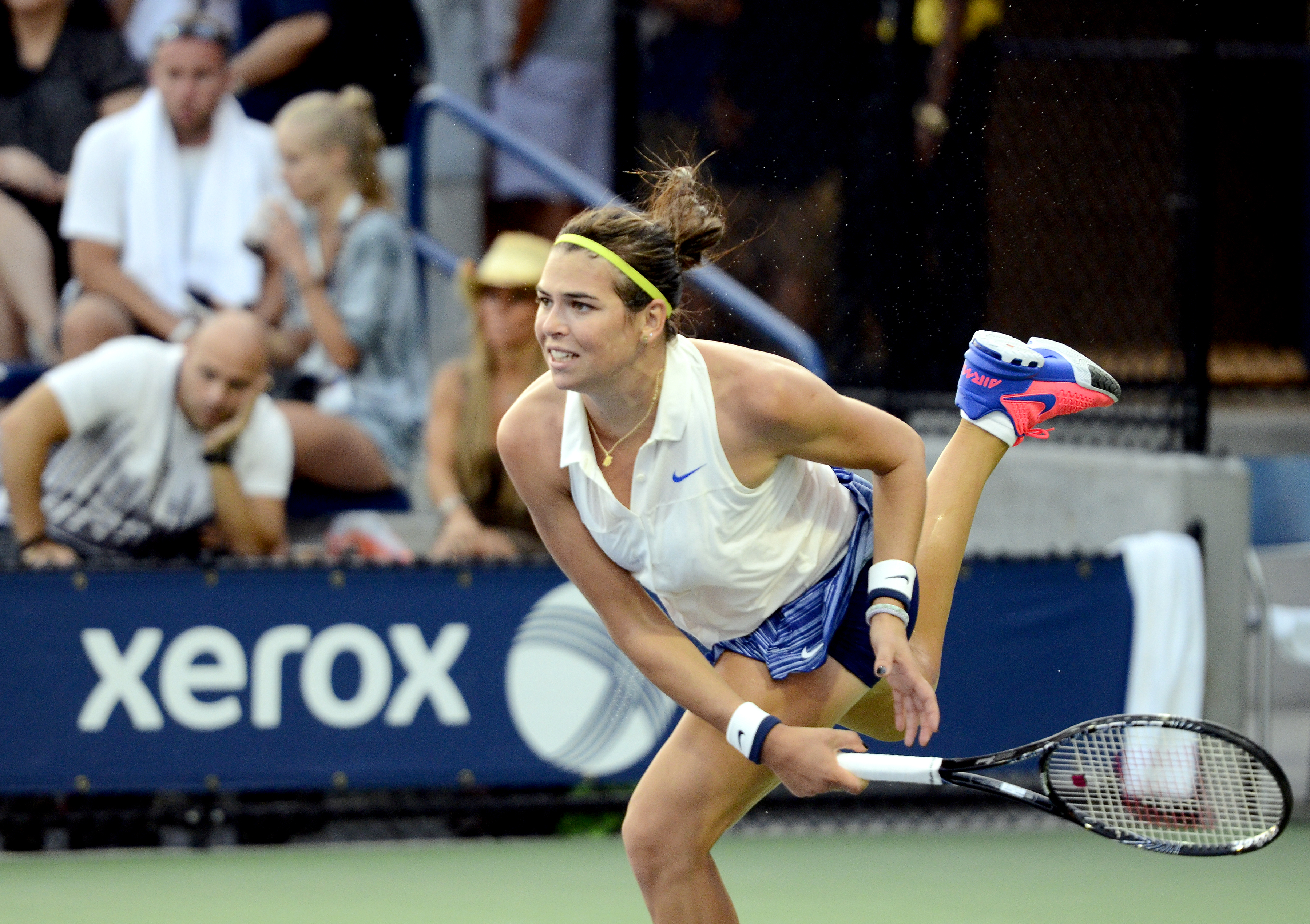 August 26, 2014 Queens, NY Carla Suarez Navarro (ESP) def. Ajla Tomljanovic (AUS)